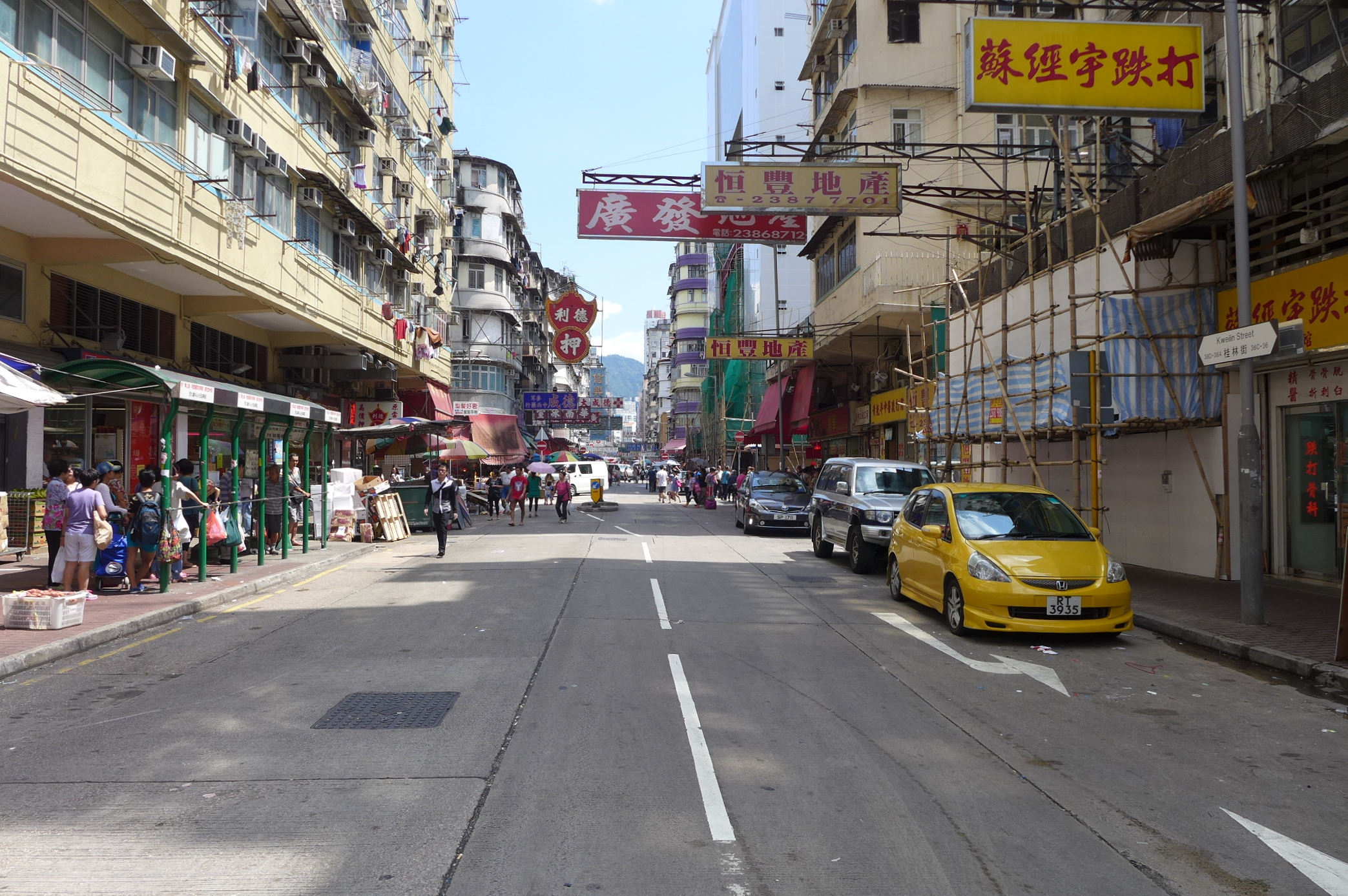 Kweilin Street, Sham Shui Po